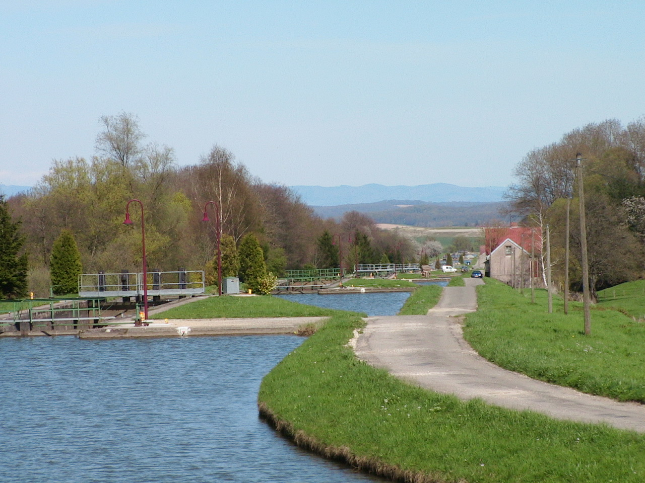 Canal Rhin Rhone à Valdieu-Lutran (68) Seuil de Valdieu : échelle d'écluses Photo prise le 23/04/2006 par F5ZV